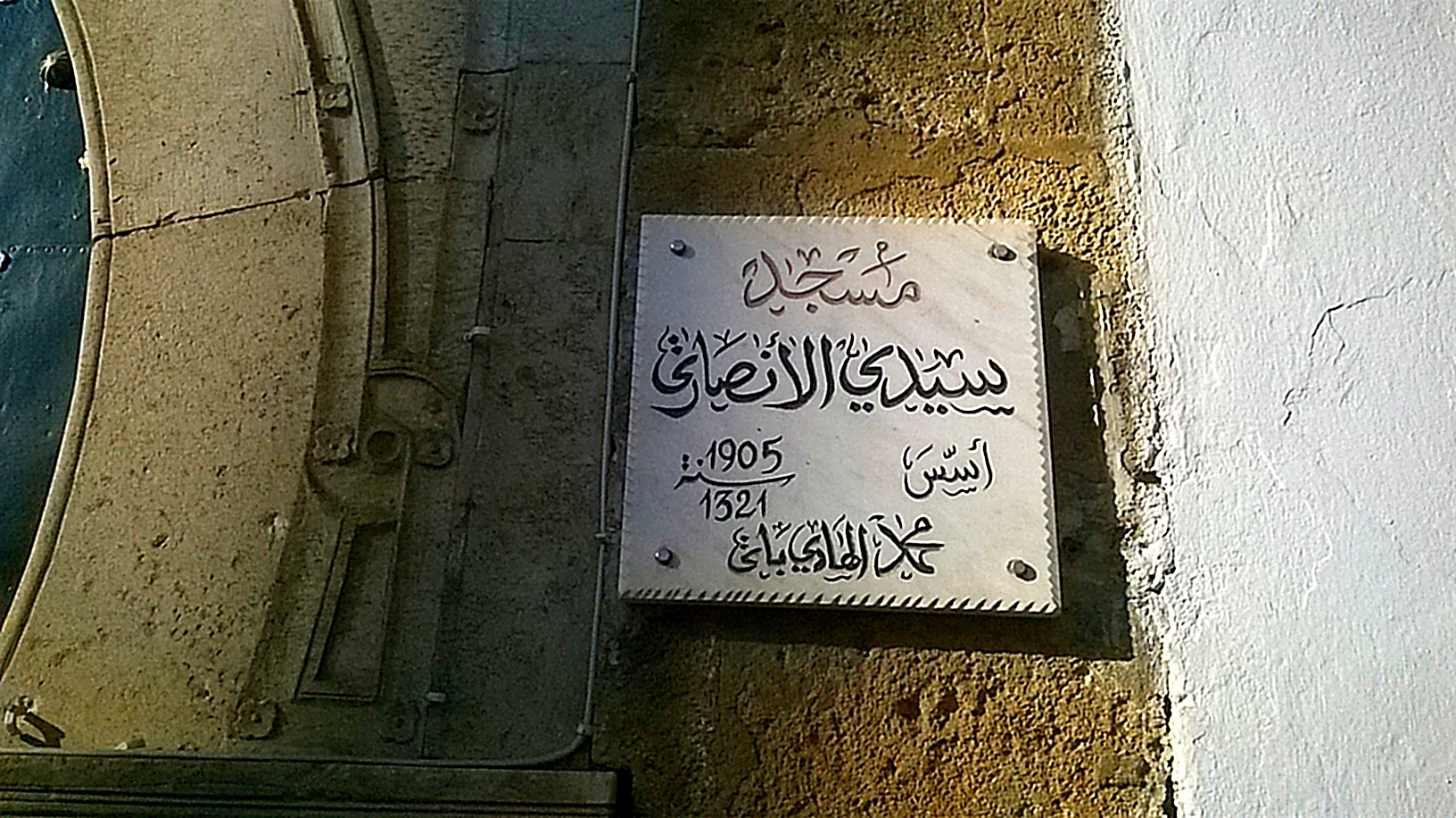 Plaque en marbre indiquant la mosquée Sidi El Ansari , El Kaadine , Bab Souika , la médina de Tunis